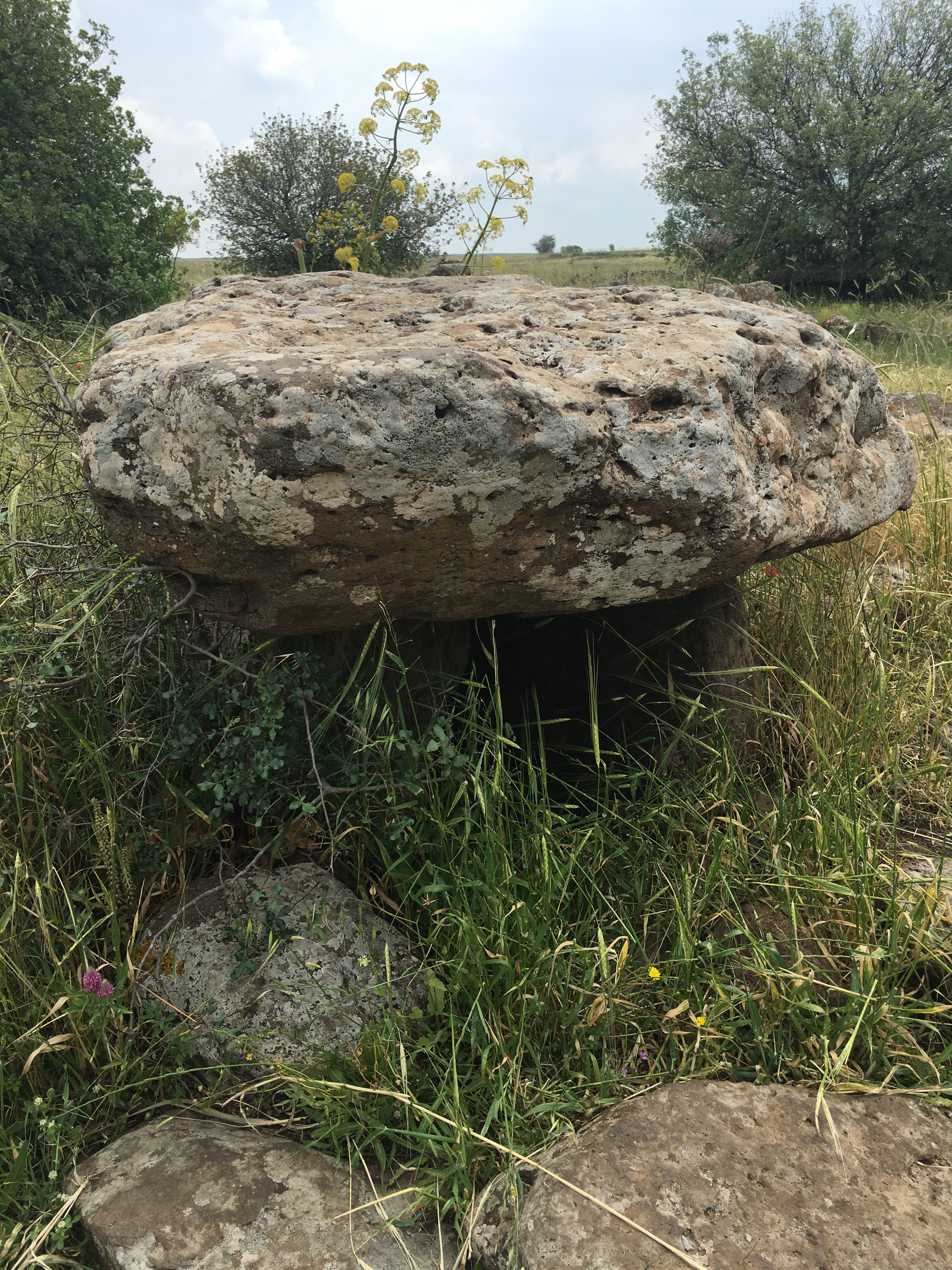 דולמן - דולמן הוא מבנה מגליתי, כלומר בנוי מאבנים גדולות, שמקורו לרוב בתקופות הפרהיסטוריות המאוחרות.